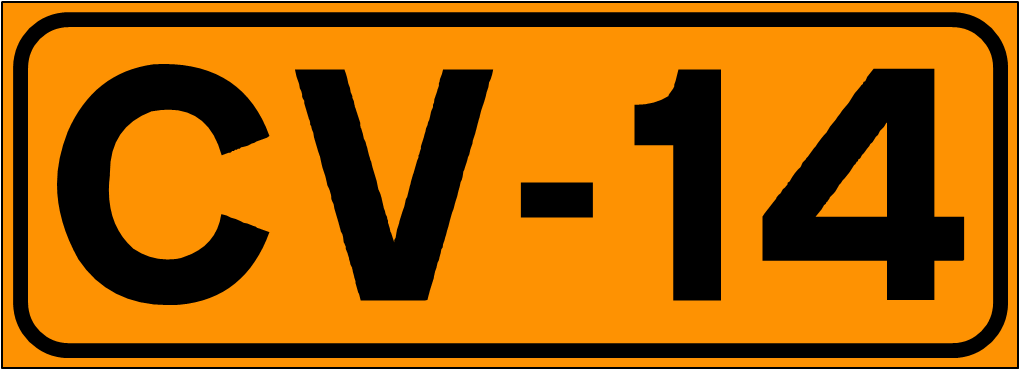 Inidcador de la Carretera de la Comunidad Valenciana CV-14